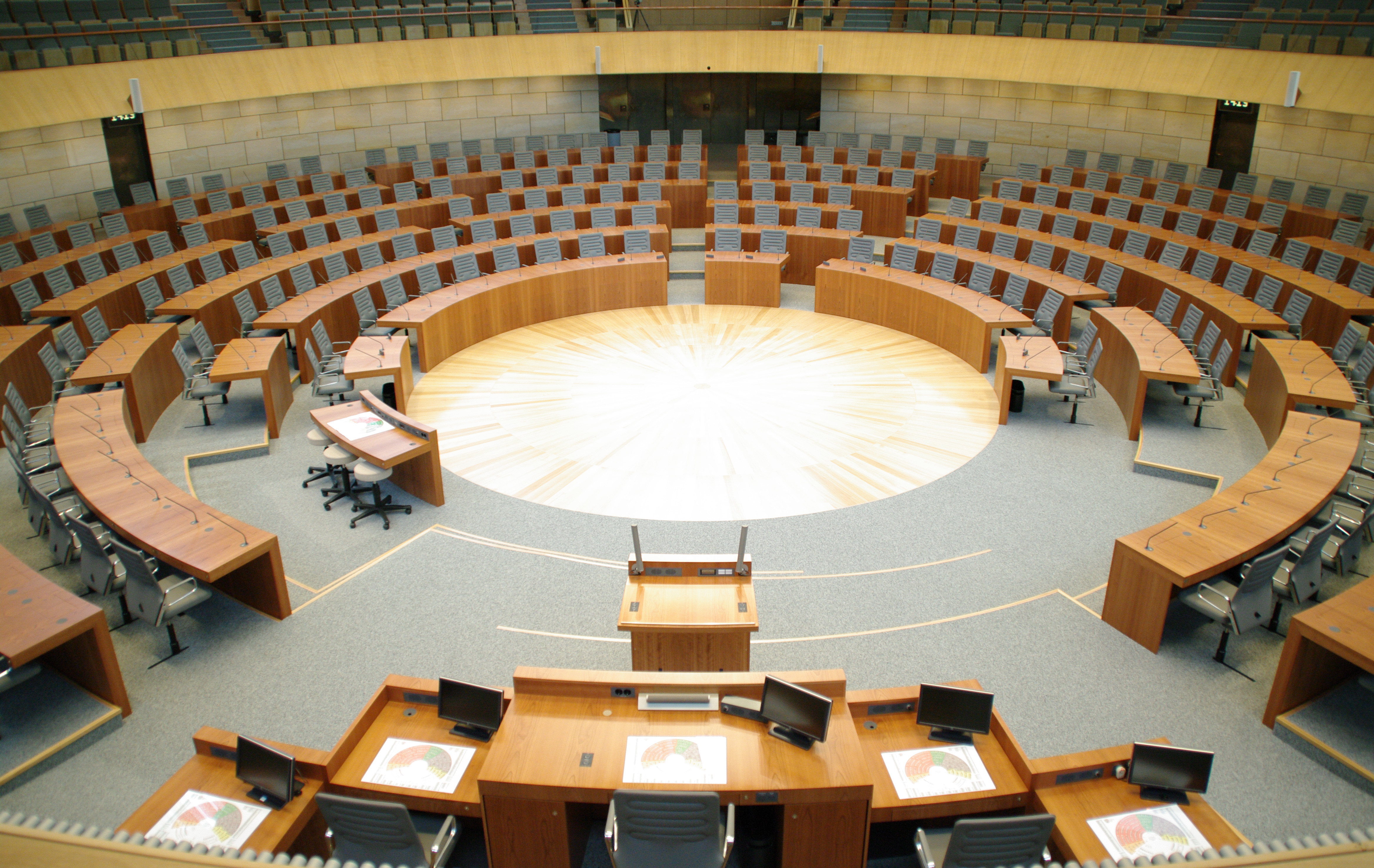 Innenbereich des Plenarsaals Landtag Nordrhein-Westfalen